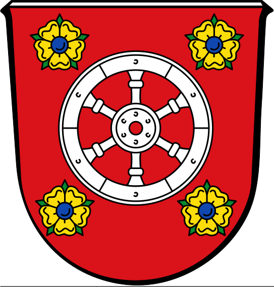 Wappen von Rosenthal